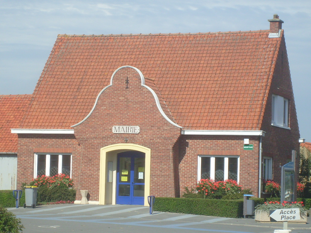 La mairie des Moëres